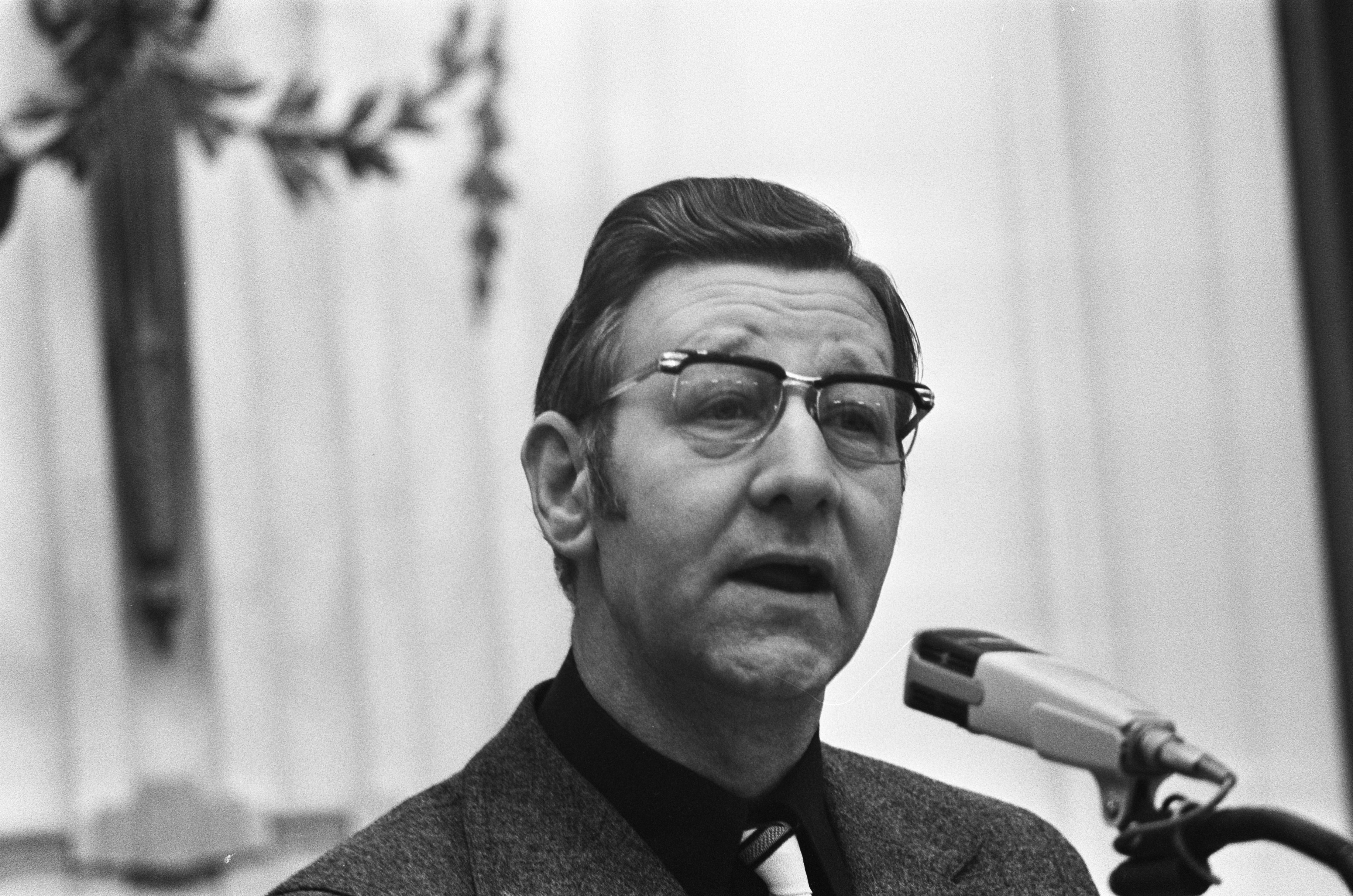 Collectie / Archief : Fotocollectie Anefo Reportage / Serie : Debat in de Tweede Kamer Beschrijving : Kamerlid Tolman (CHU) Datum : 25 februari 1974 Locatie : Den Haag, Zuid-Holland Trefwoorden : parlementaire debatten, parlementariërs, portretten Persoonsnaam : Tolman, Teun Instellingsnaam : CHU Fotograaf : Rob Mieremet / Anefo Auteursrechthebbende : Nationaal Archief Materiaalsoort : Negatief (zwart/wit) Nummer archiefinventaris : bekijk toegang 2.24.01.05 Bestanddeelnummer : 927-0273